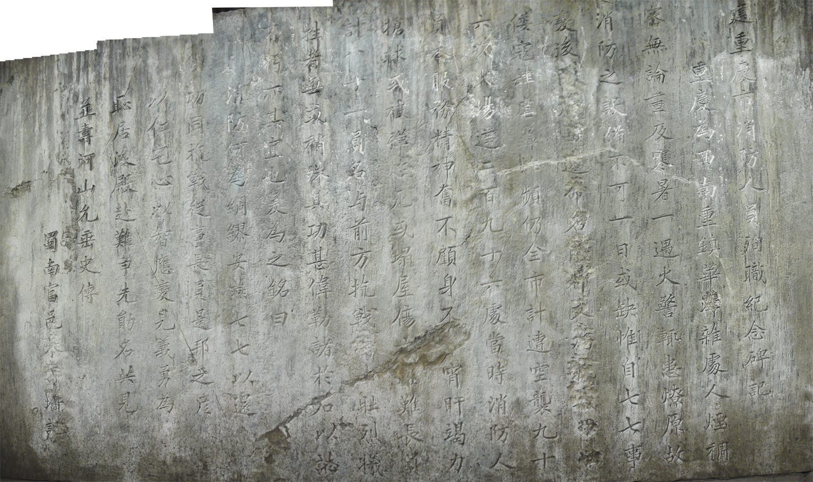 重慶市消防人員殉職紀念碑正面碑文